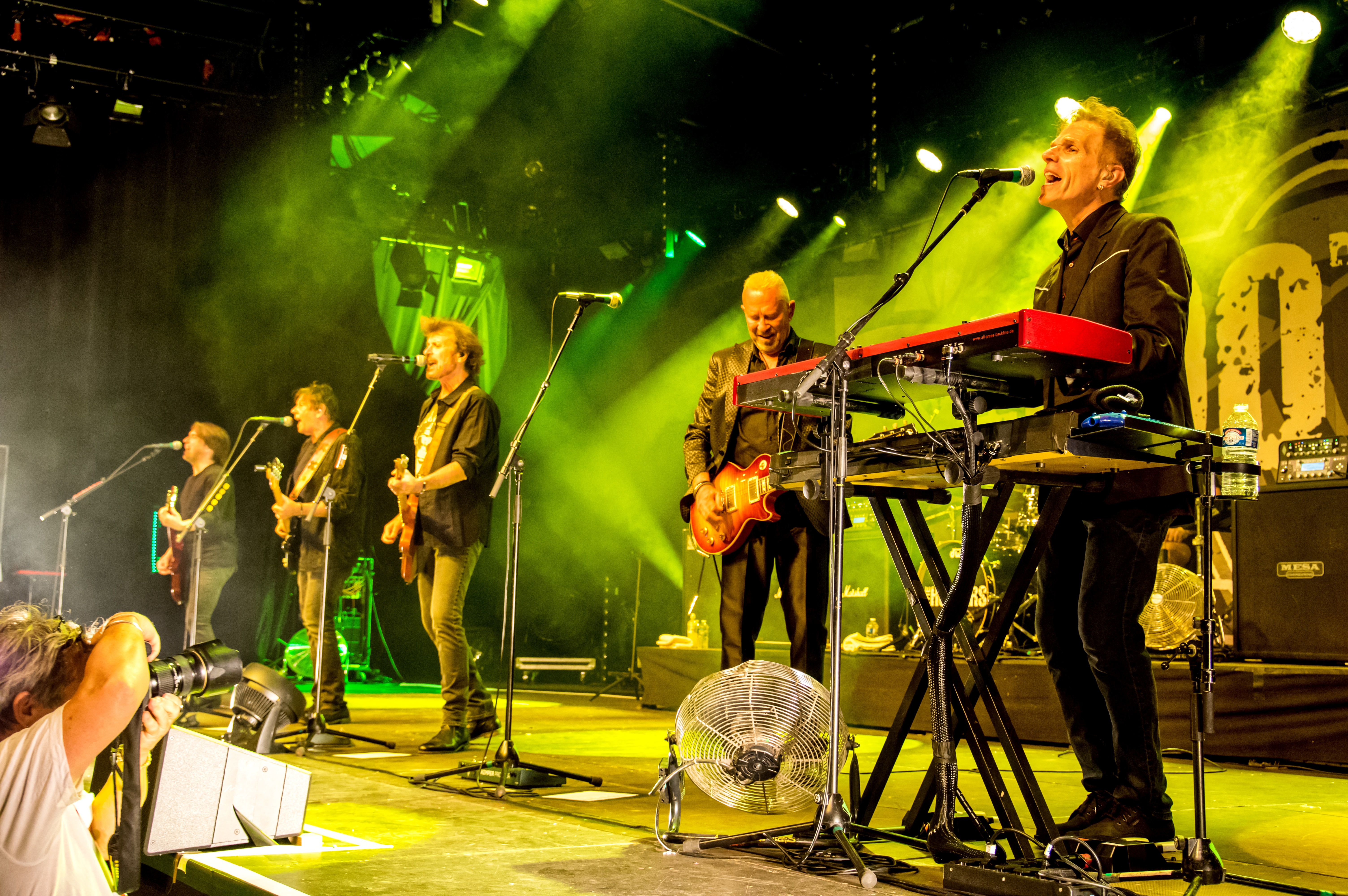 Bilder vom Zelt Musik Festival 2018 in Freiburg im Breisgau Auftritt The Hooters am 26. Juli 2018 im Zirkuszelt